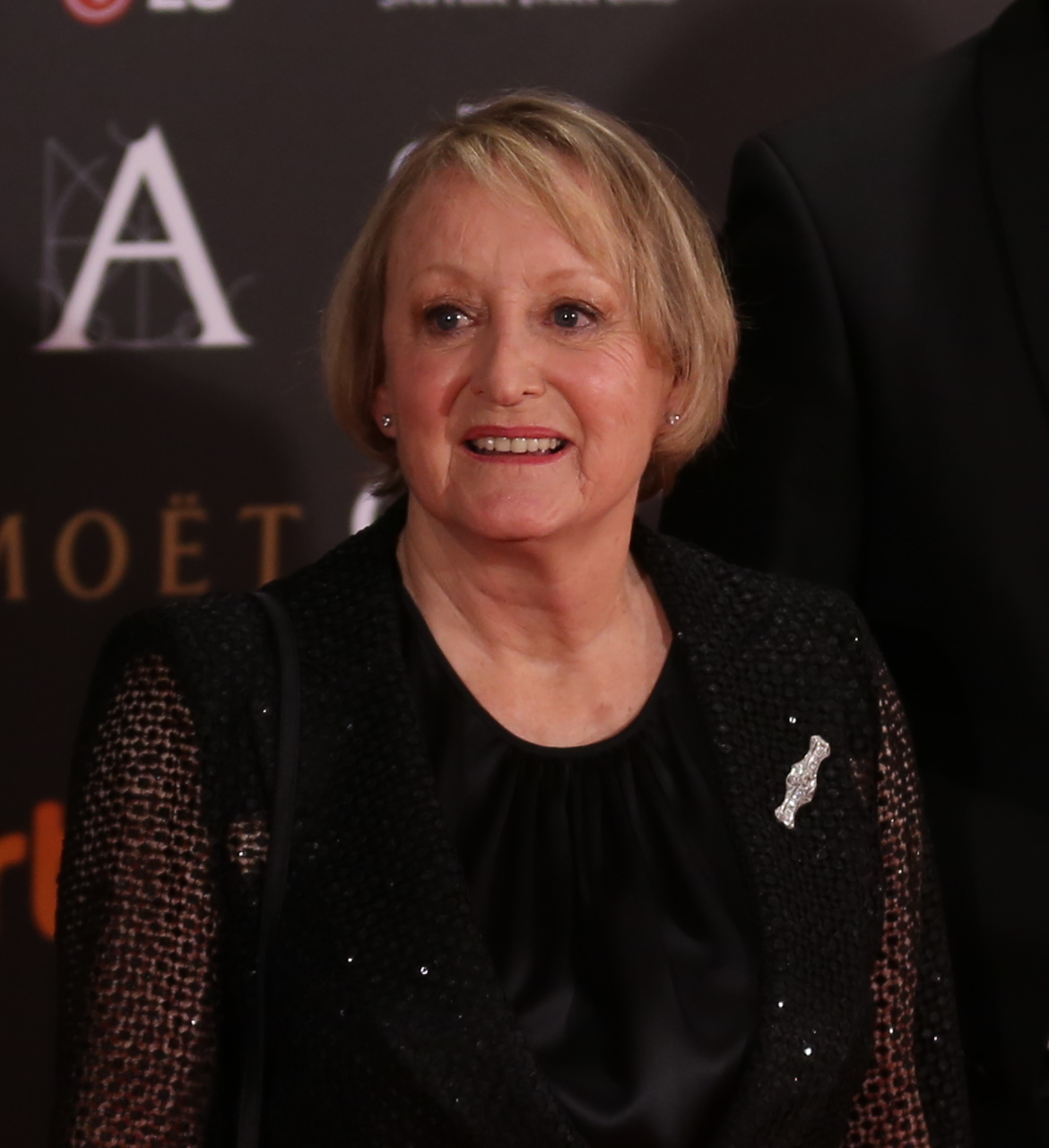 Premios Goya 2017